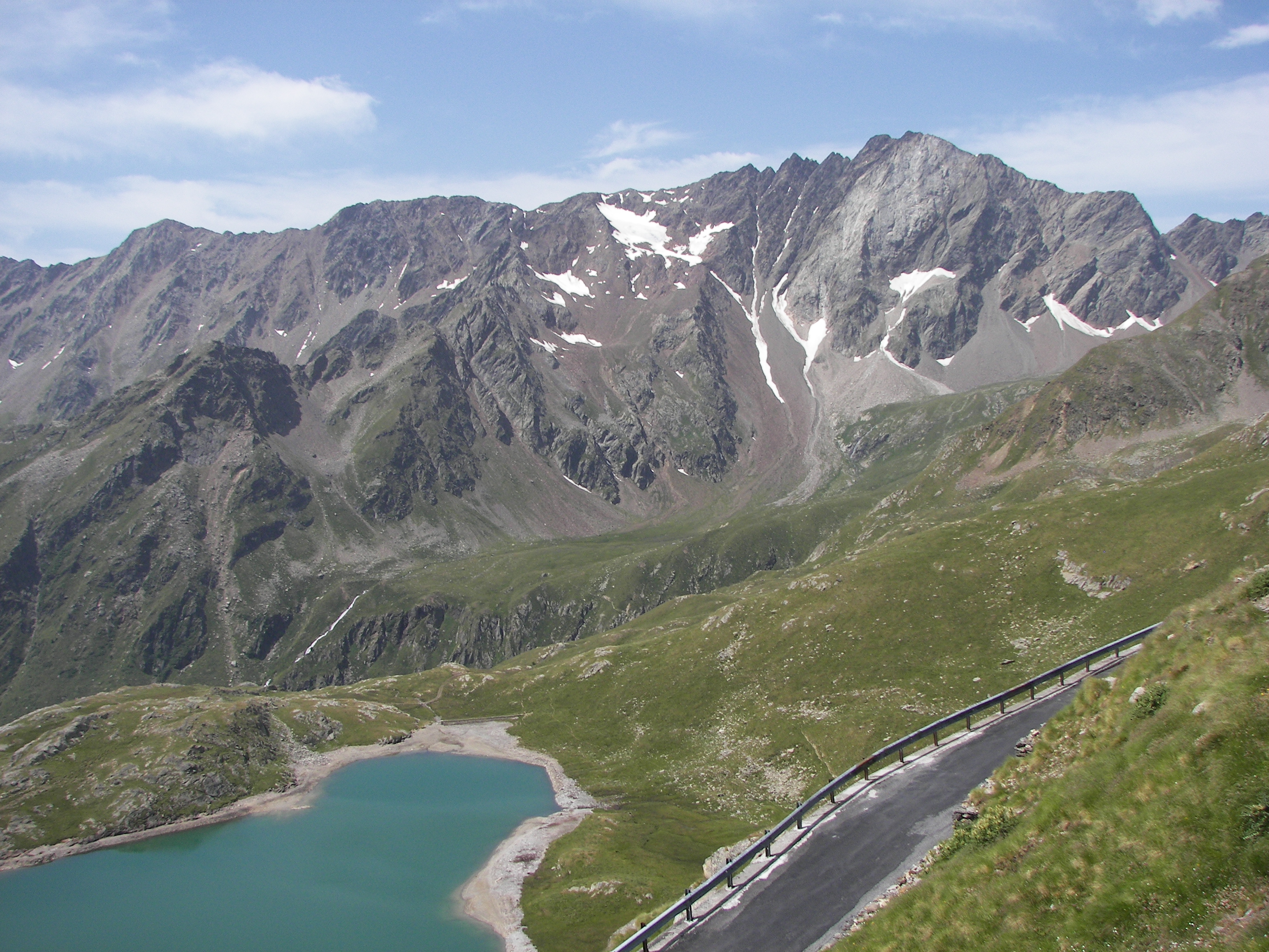 Lago Nero, Ponte di Legno, Province of Brescia, Italy